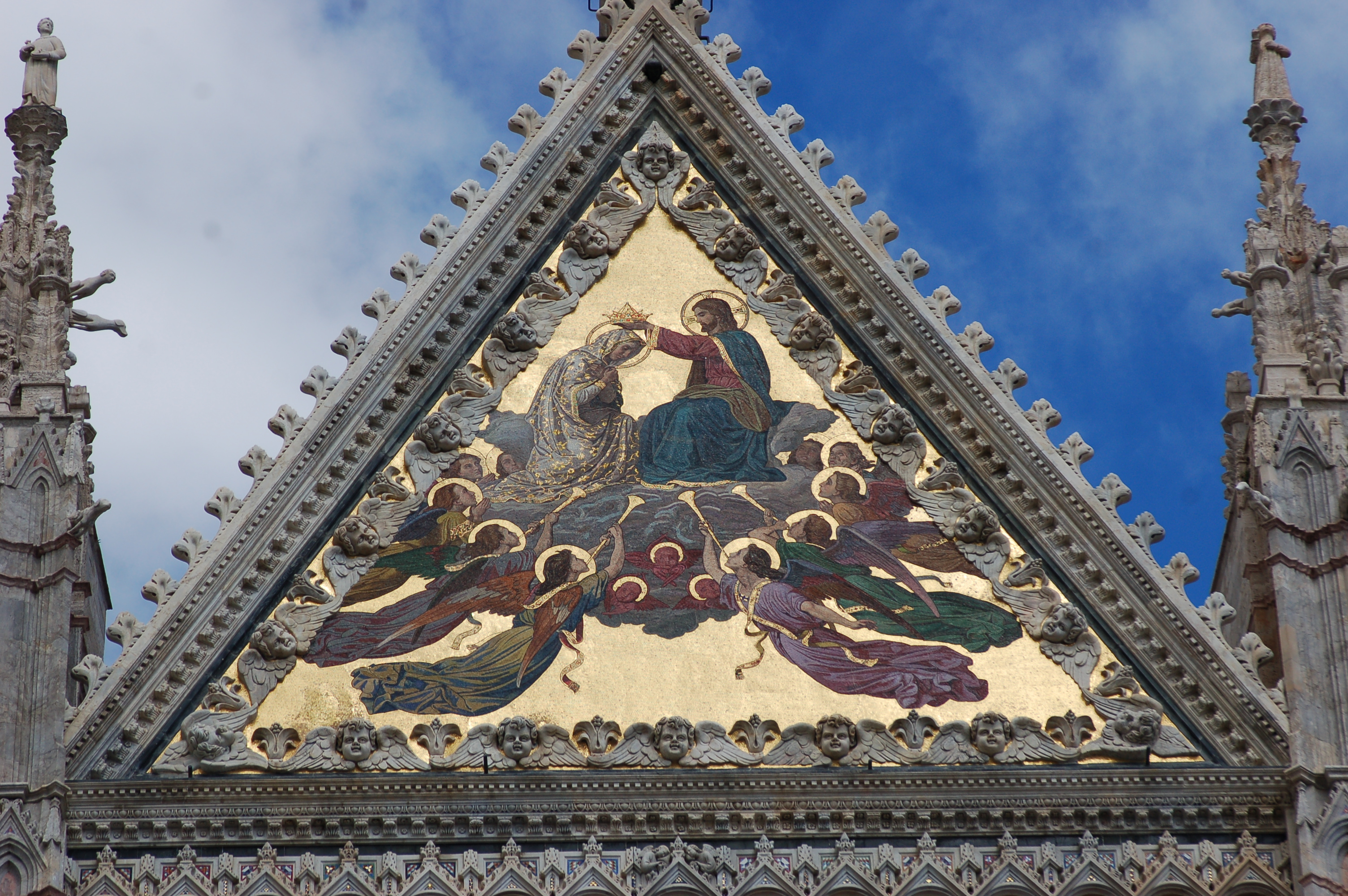 detail